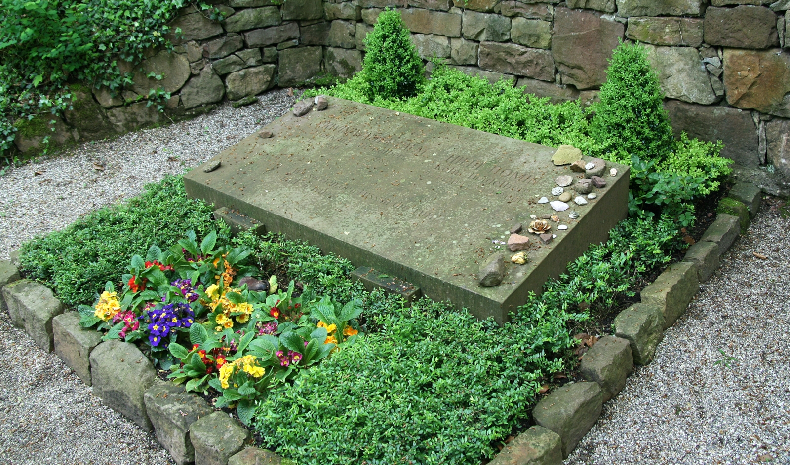 Hilde Domin Grab Bergfriedhof Heidelberg